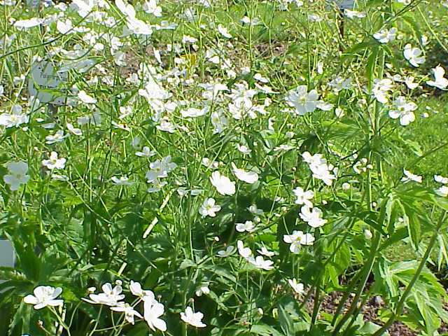 Species: Ranunculus aconitifolius Family: Ranunculaceae Image No. 3